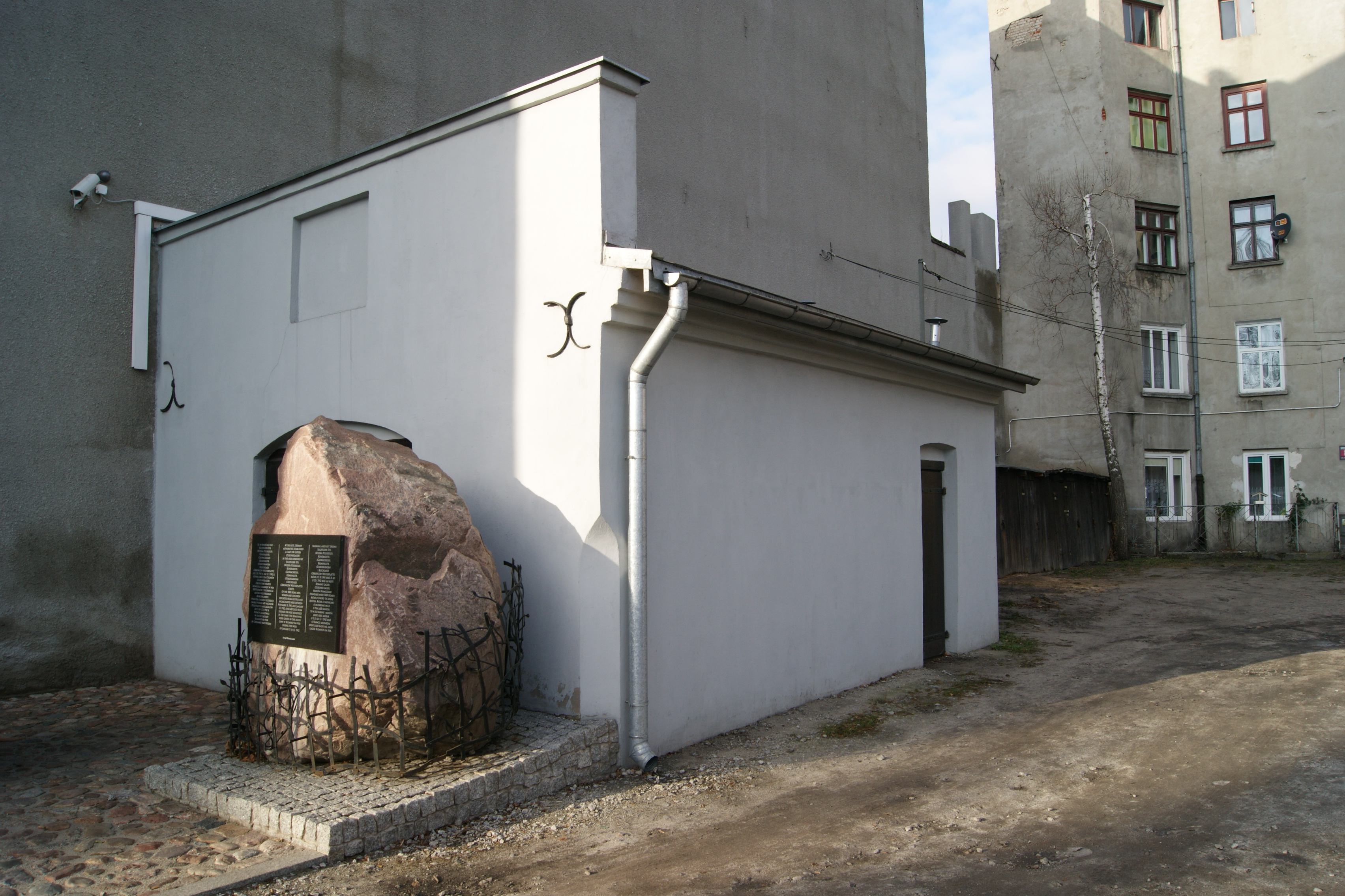 Muzeum Tradycji Niepodległościowych w Łodzi, wystawa stała "Kuźnia Romów", ul. Wojska Polskiego 84 - widok ogólny